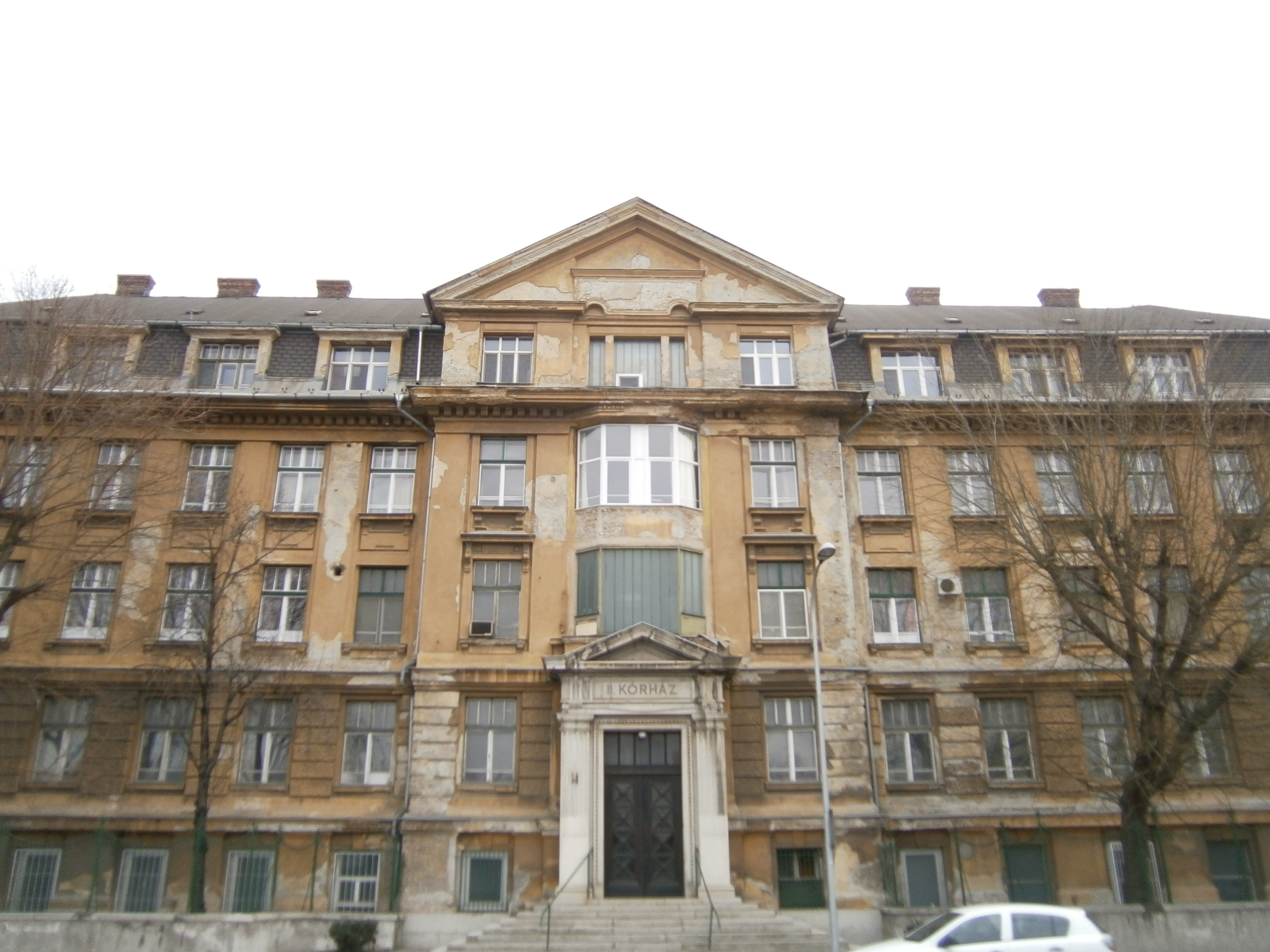 MÁV Kórház, Podmaniczky utca, Budapest, VI. kerület